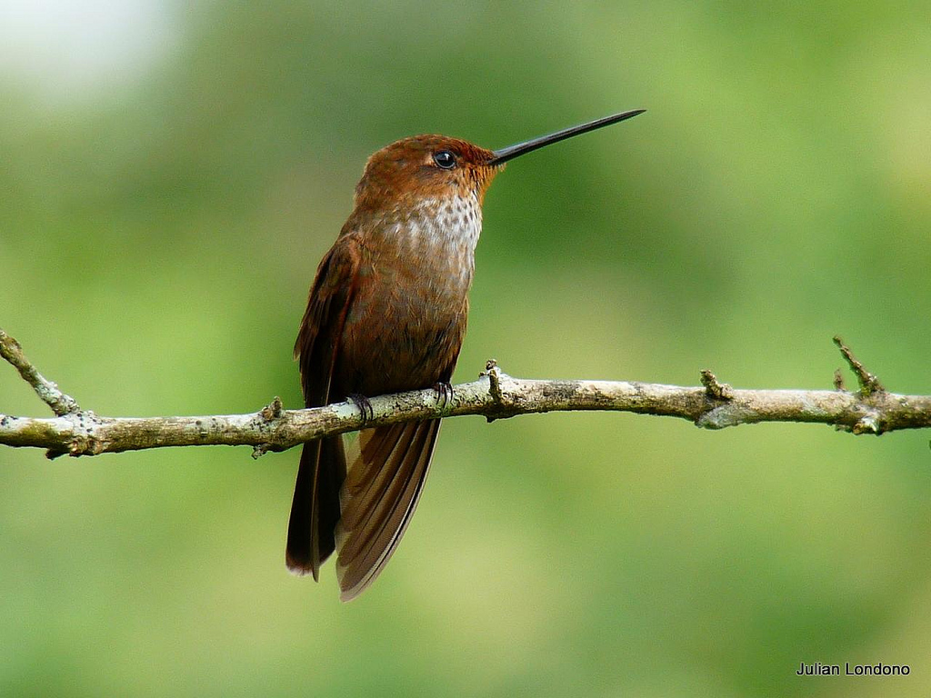 Bronzy Inca (Coeligena coeligena) Escuche el canto y vea el mapa de distribución de ésta especie aquí: Le recomiendo éstas fotos de Colibríes: SELECTED HUMMINGBIRDS Disfrute con más fotos de las Aves de Aralcal: Fotografía espontánea y al natural. Foto sin recortes o postprocesos.